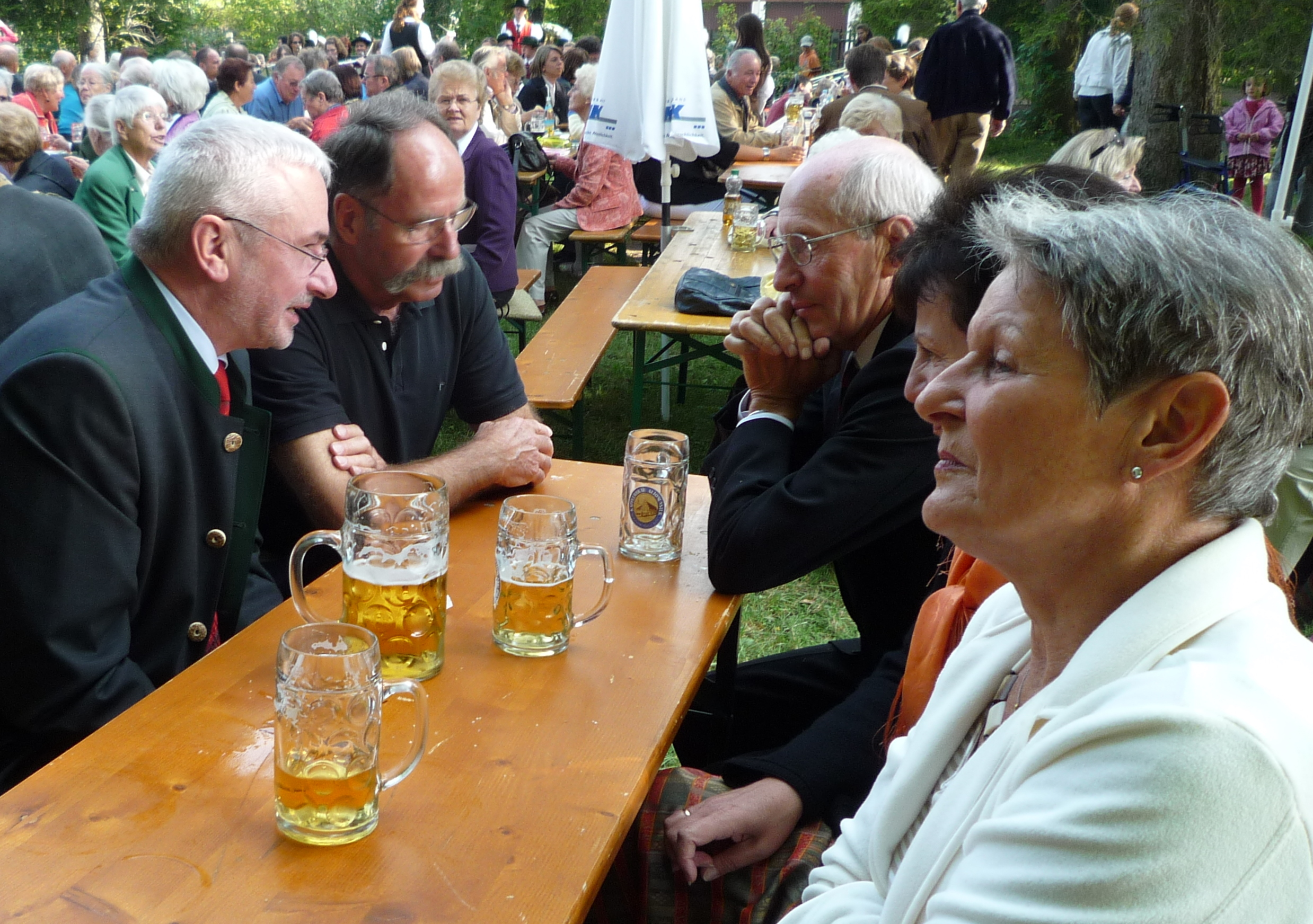 Bürgermeister Hubert Jung im Gespräch mit dem Künstler Joachim Oberländer. 2. Bürgermeisterin Gabi Riehl ( rechts) im Garten der evangelischen Friedenskirche bei der Glockeneinweihung.